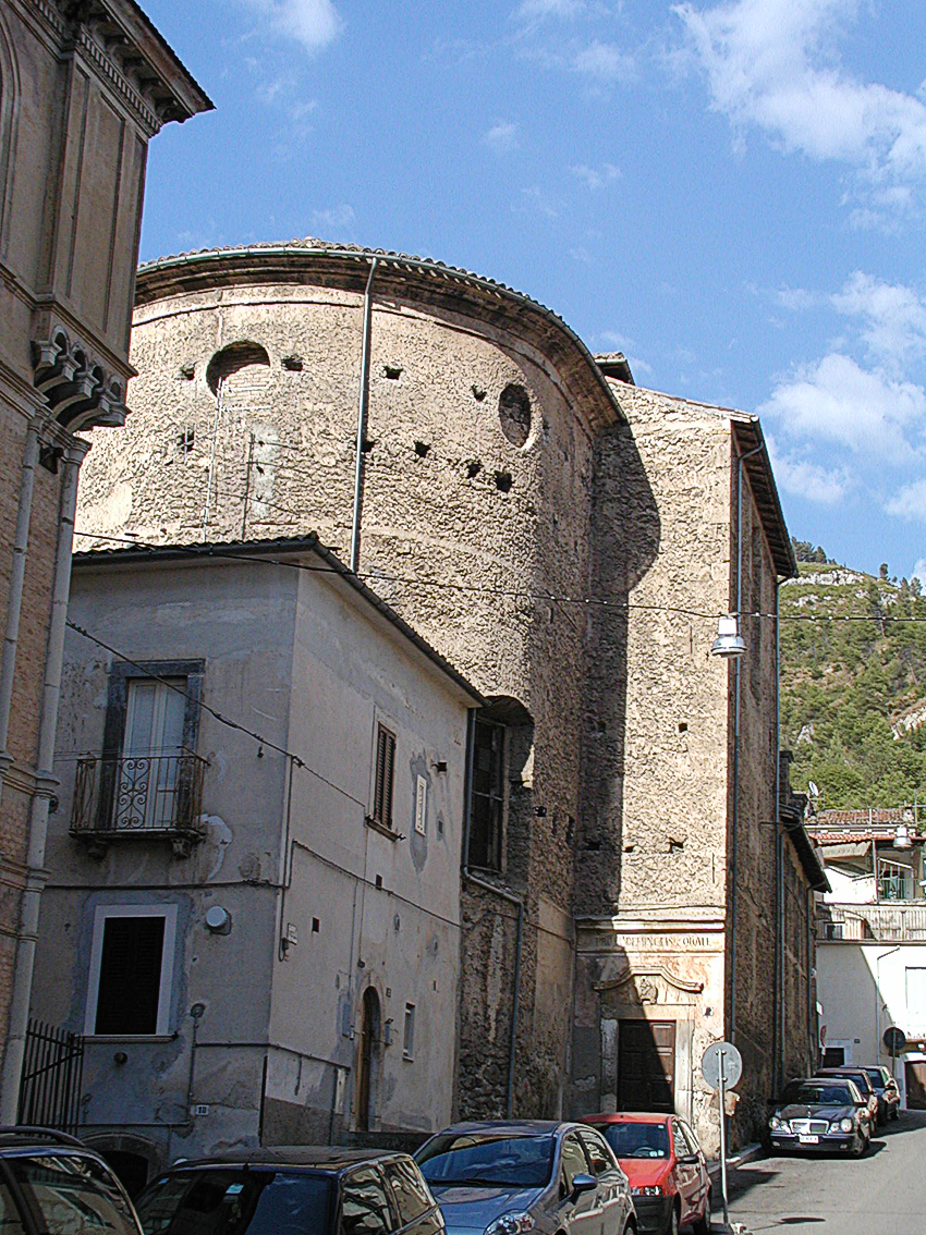 Chiesa di San Domenico a Popoli.